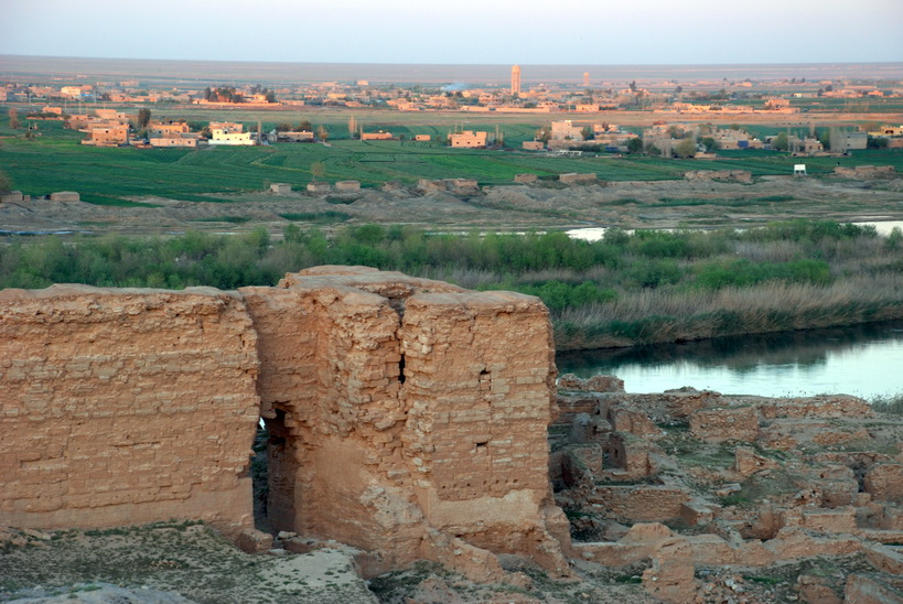 سور مملكة ماري على الفرات